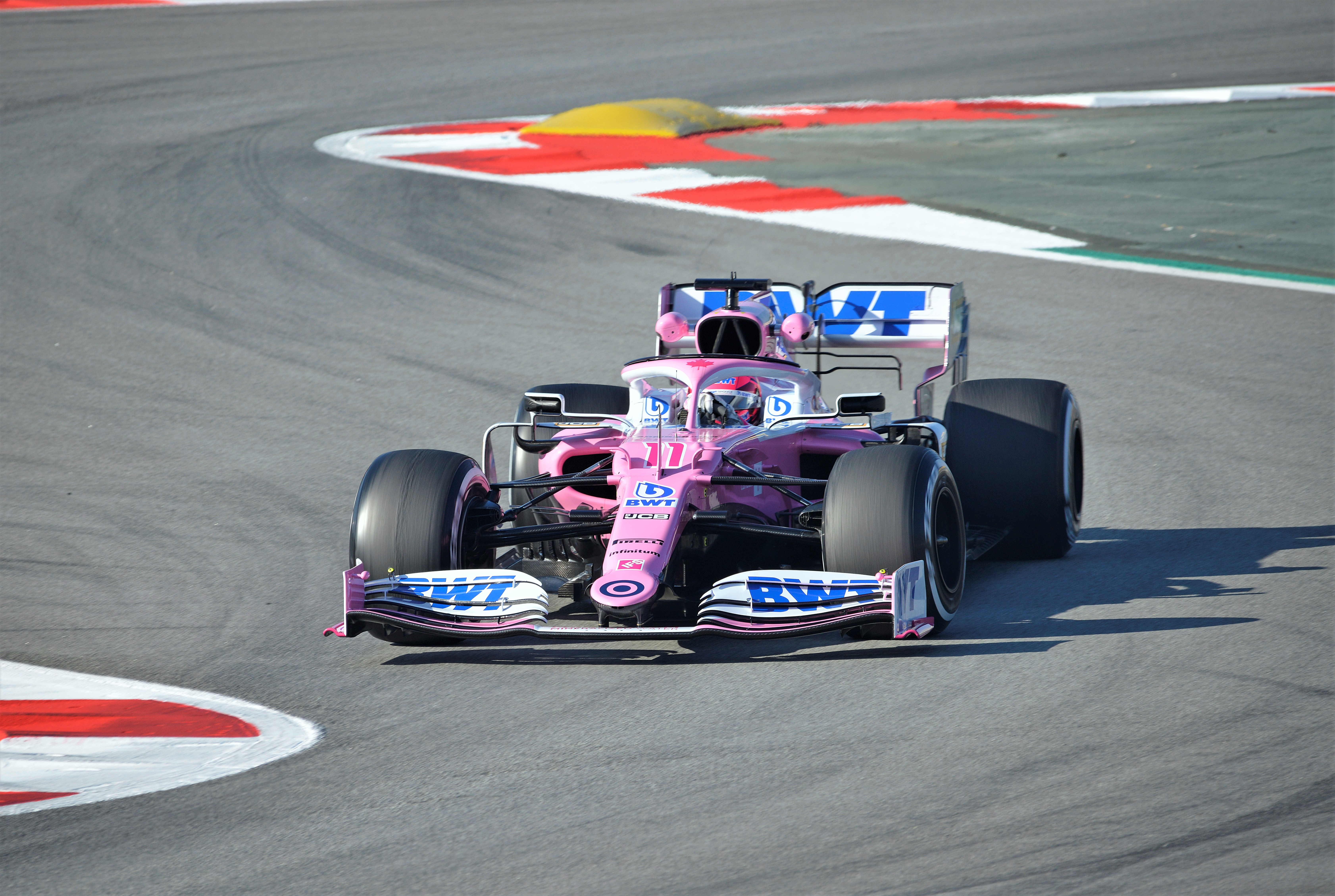 Test Days F1 2020